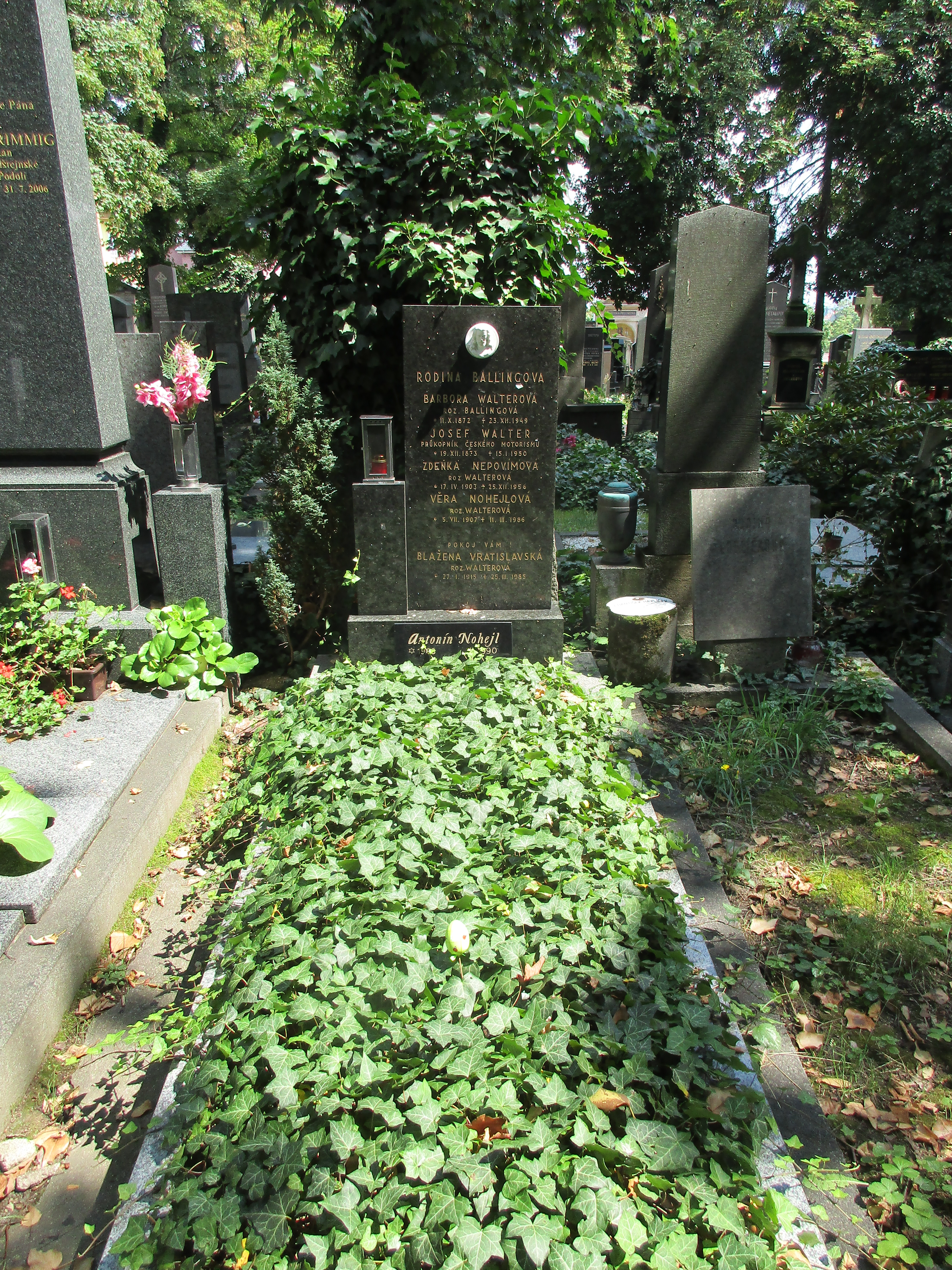 Josef Walter - (1873-1950), průkopník českého motorismu, vynálezce, konstruktér, průmyslník, zakladatel firmy Walter.